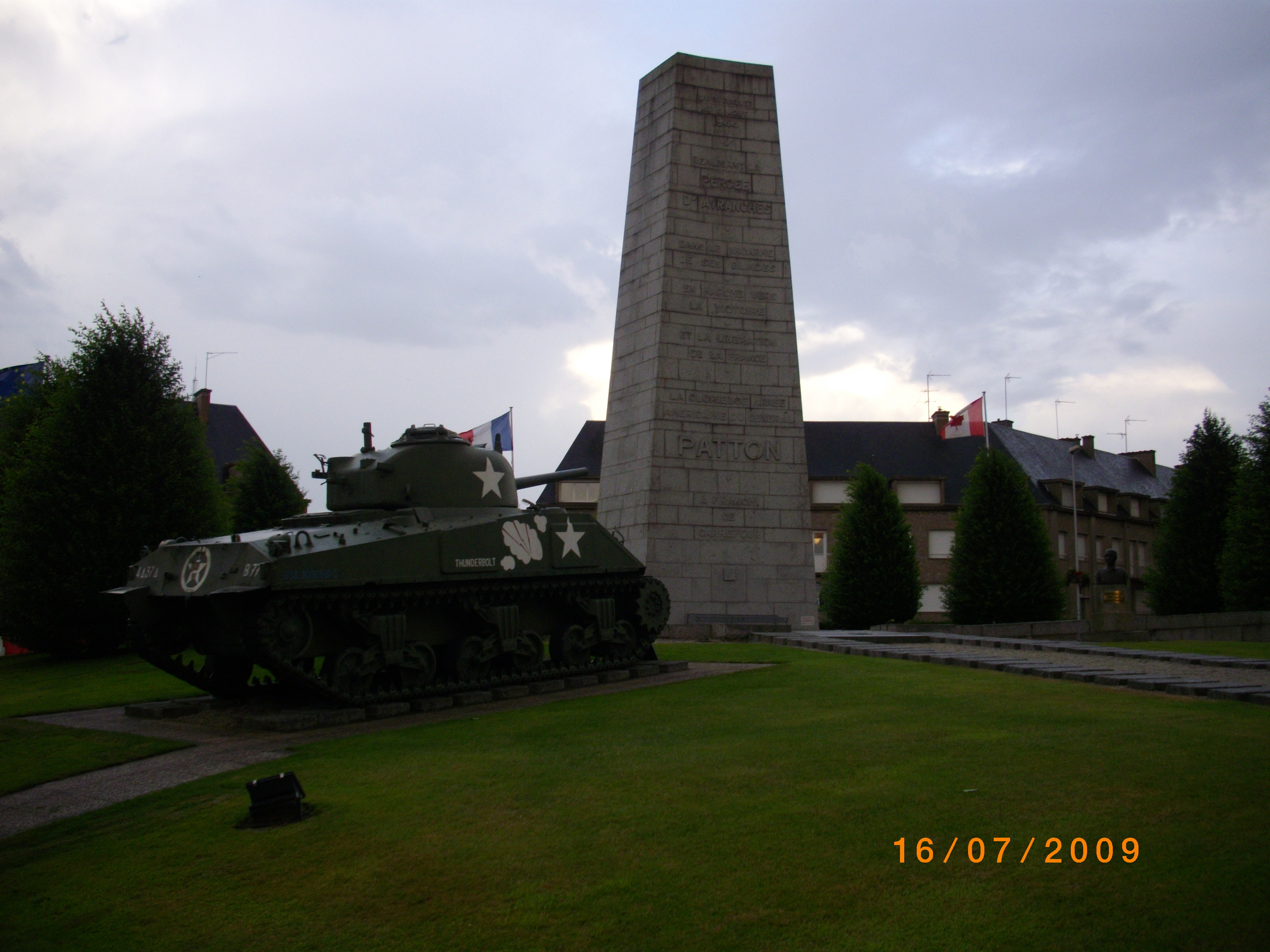 Το μνημείο Πάττον στην Αβράνς